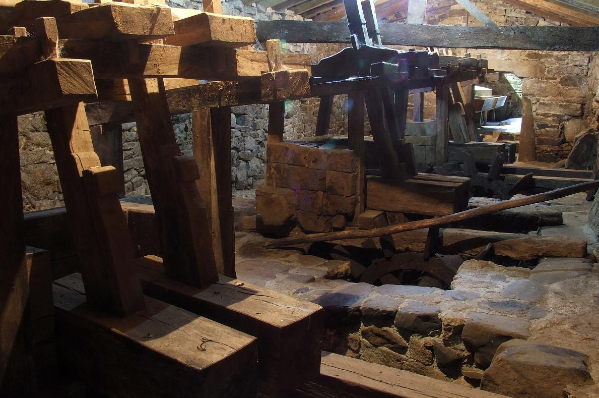 Conxunto etnográfico dos batáns de Mosquetín.